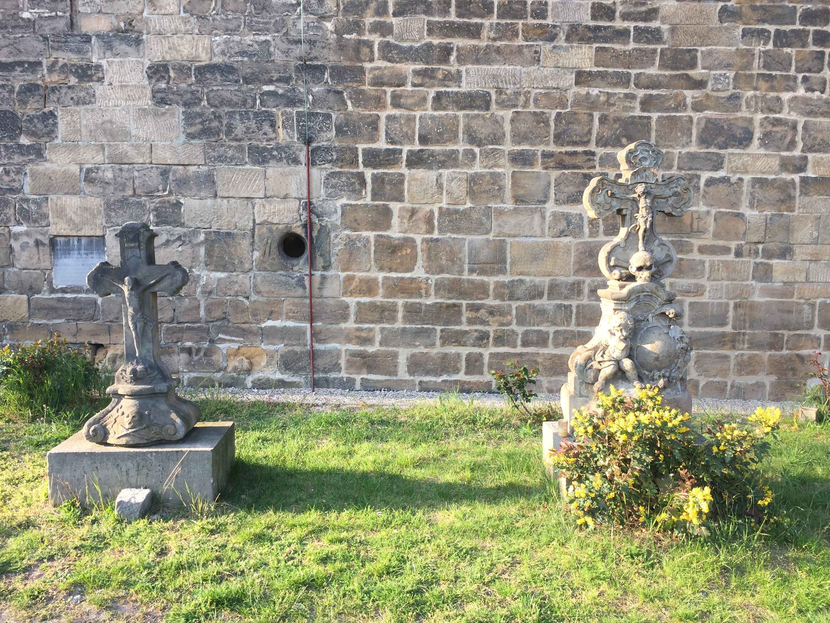 ukázka pomníků bývalého hřbitova